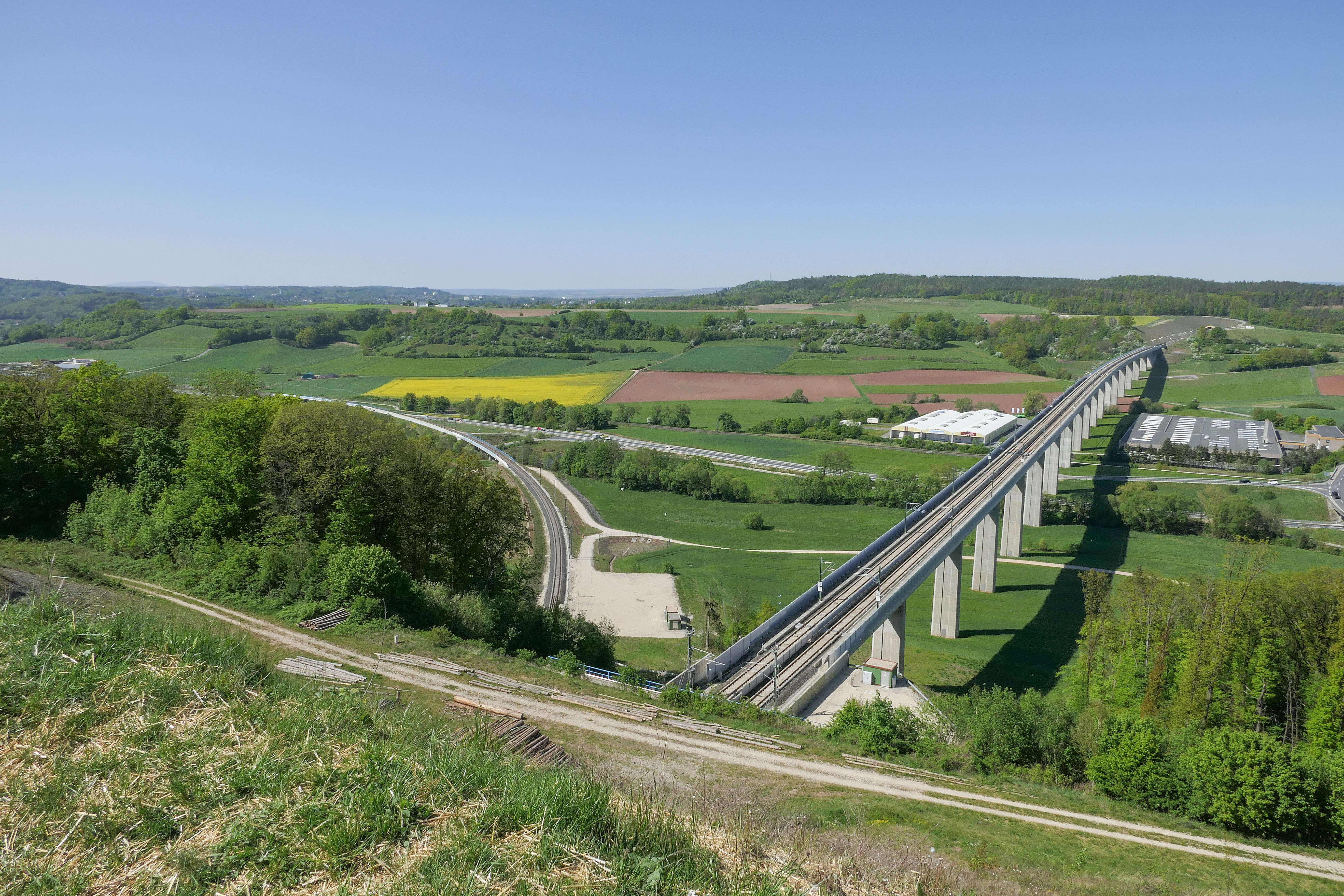 Vom Höhnberg aus mündet die Hochgeschwindigkeitstrasse nach der Talquerung am Gegenhang in den Tunnel Rennberg. Nach links in den Talgrund führt die Einschleifung in Richtung Coburg.